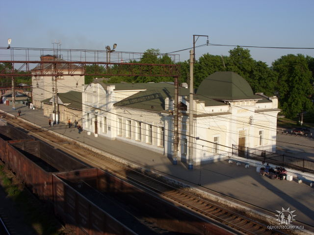 ЖД Вокзал